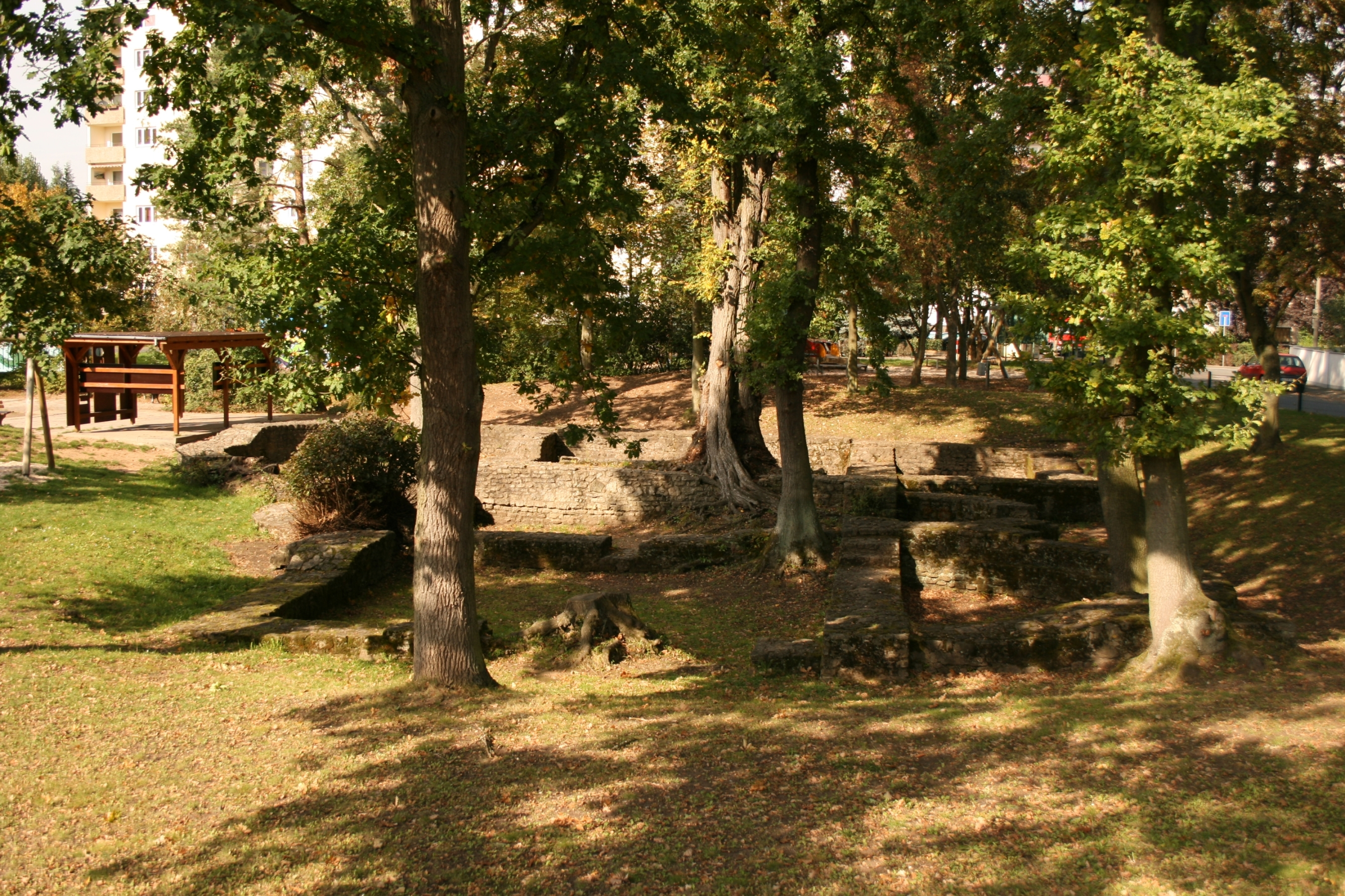 Roemisches Kastellbad Erlensee-Rückingen, Hessen, Blick von S, links im Bild Informationspavillon.